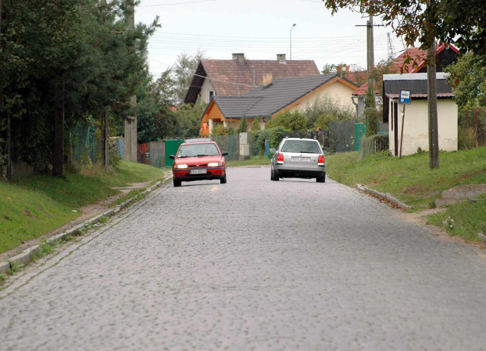 Droga w Recławiu